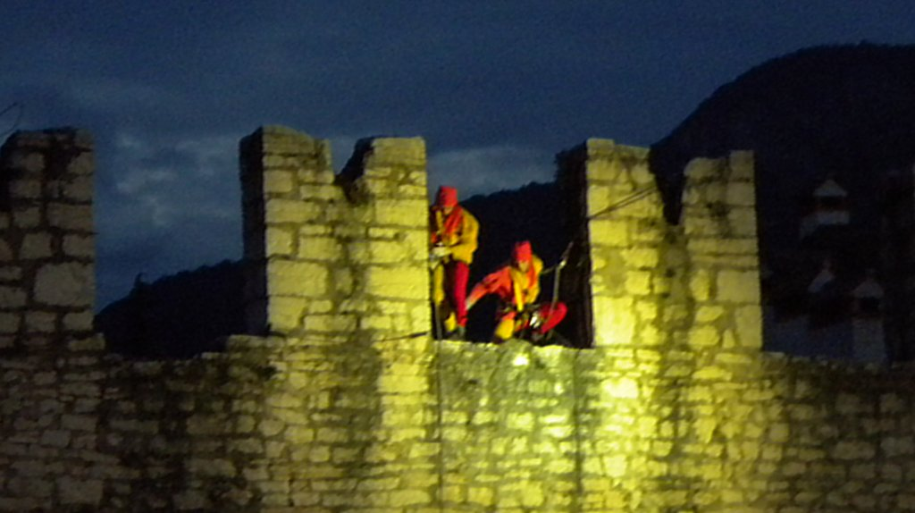 Mascherata dei Ciusi e Gobj: I Ciusj sulle mura di Piazza Fiera. Feste Vigiliane 2009, Trento